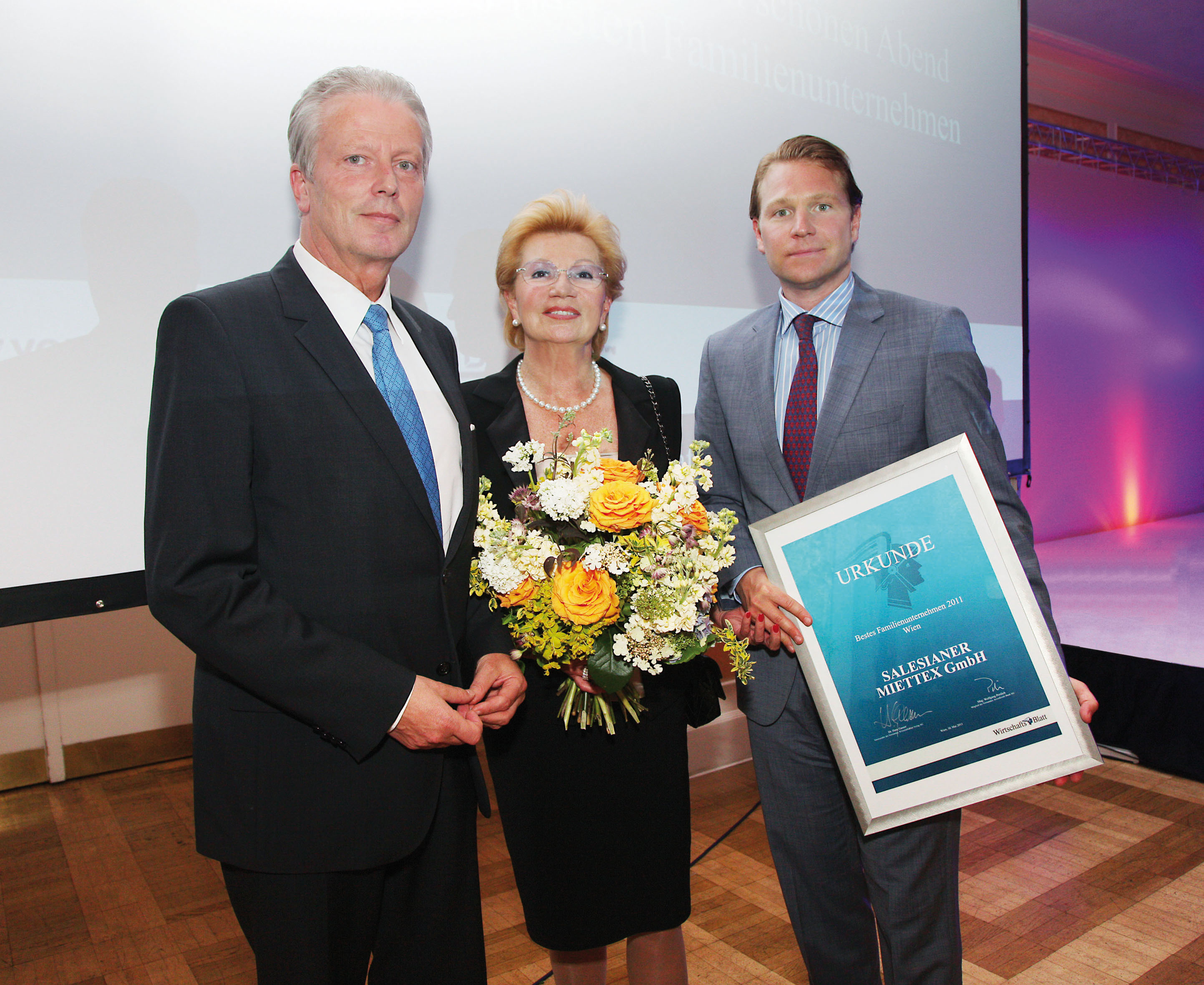 Das Wirtschaftsblatt zeichnet die Salesianer Miettex GmbH mit dem Preis "bestes Familienunternehmen Wiens 2011" aus.